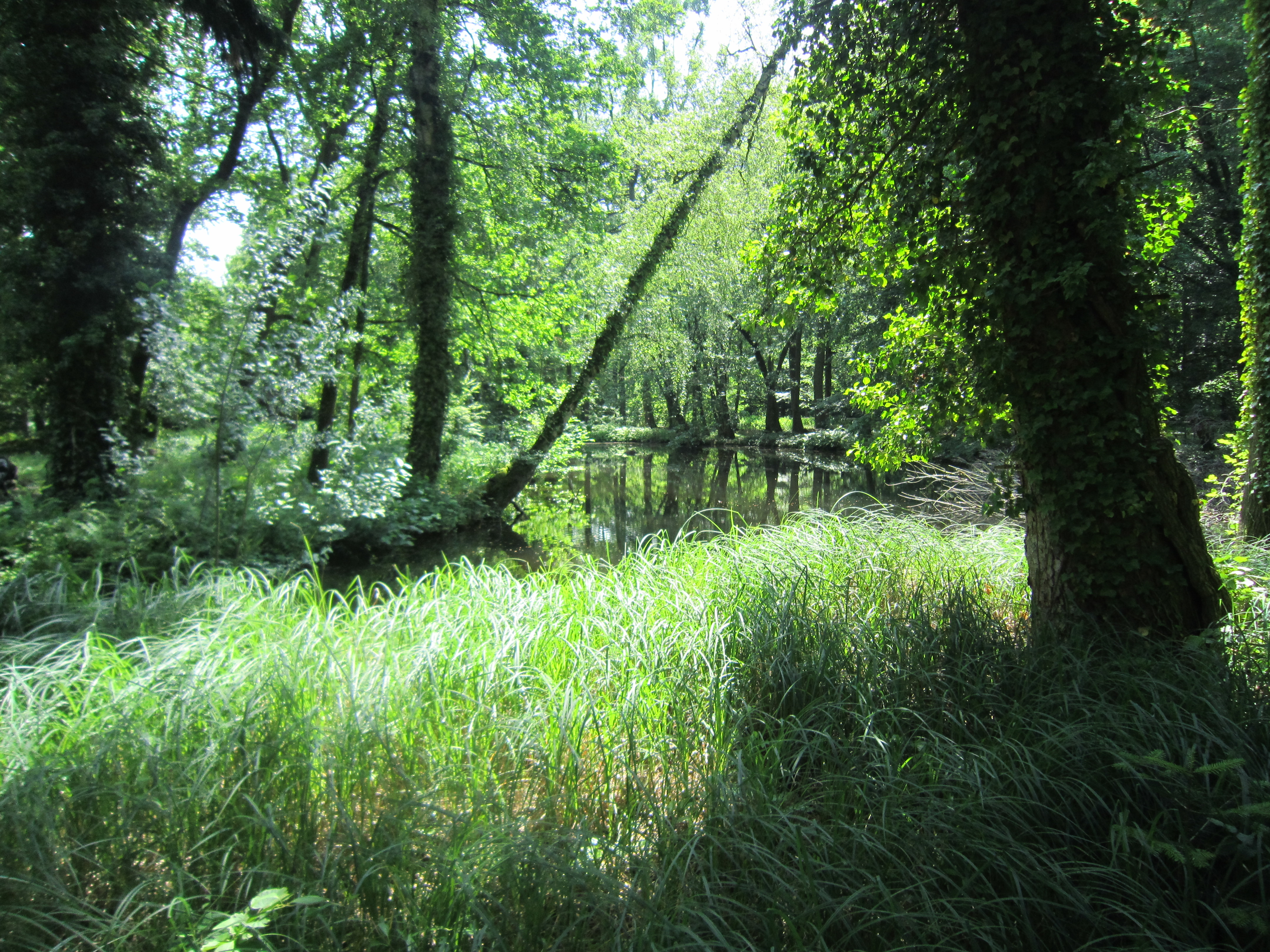 Waldstück unmittelbar westlich des Schlosses Ippenburg (Gemeinde Bad Essen im niedersächsischen Landkreis Osnabrück), während des Gartenfestivals im Sommer 2019 für die Öffentlichkeit zugänglich gemacht.